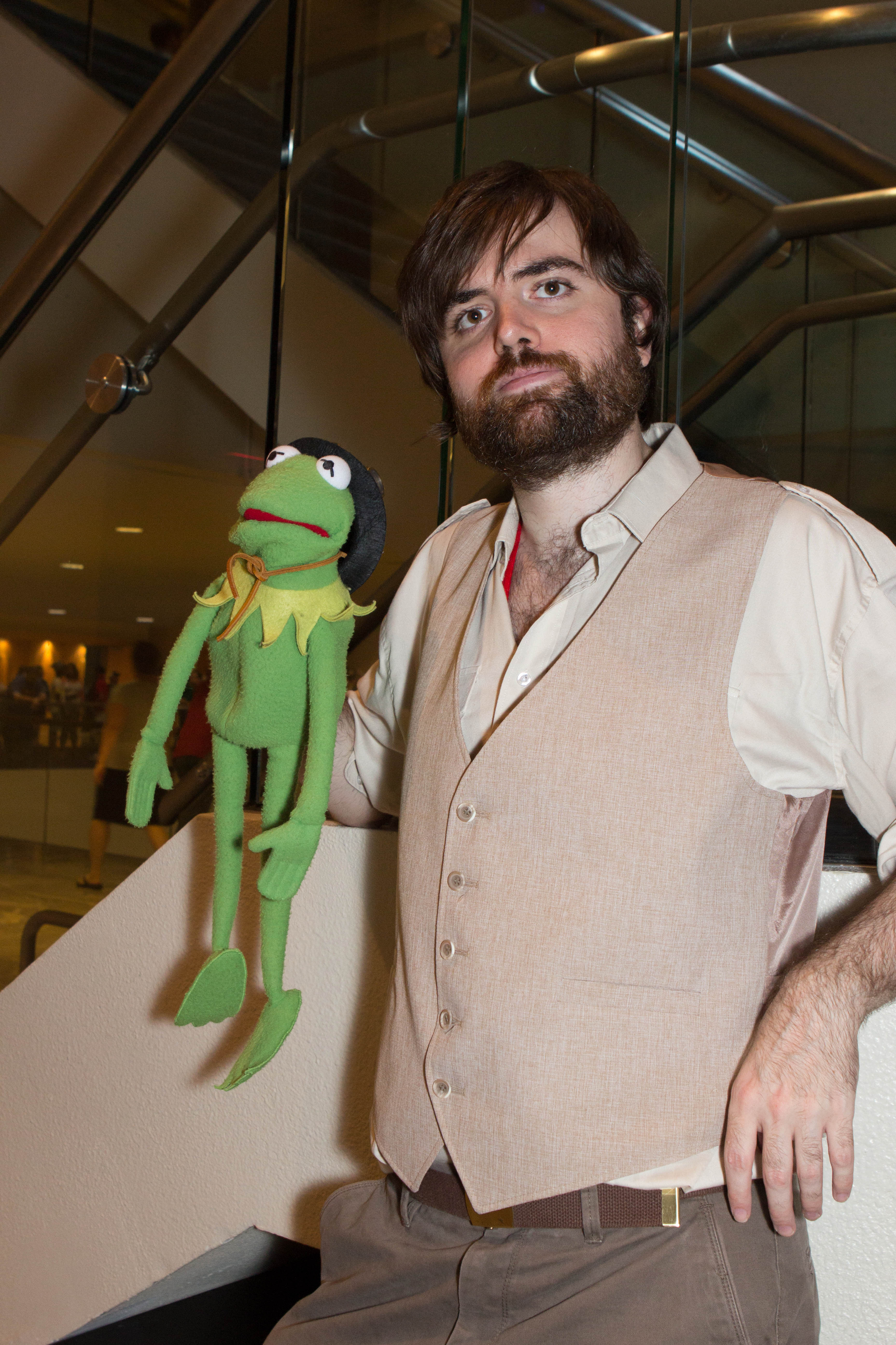 Cosplay at Dragon*Con 2013.